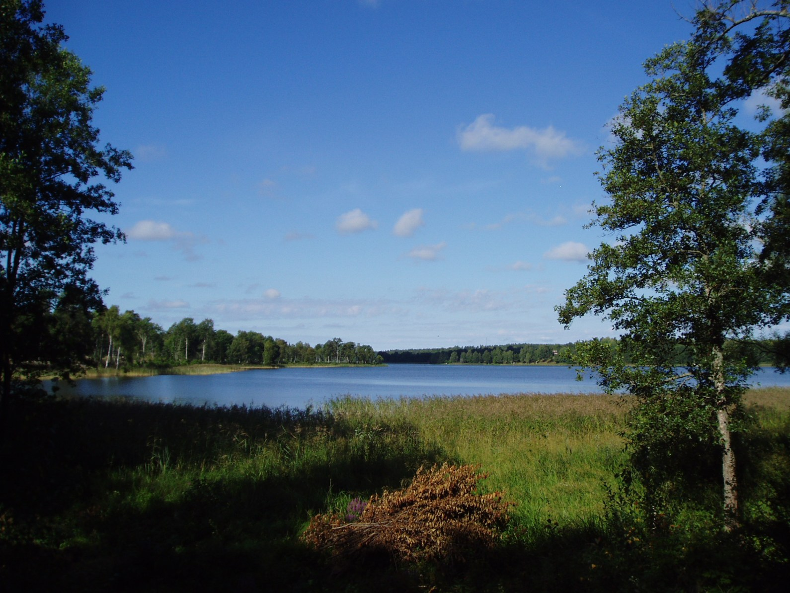 Sparren, Norrtälje kommun, vy från öst